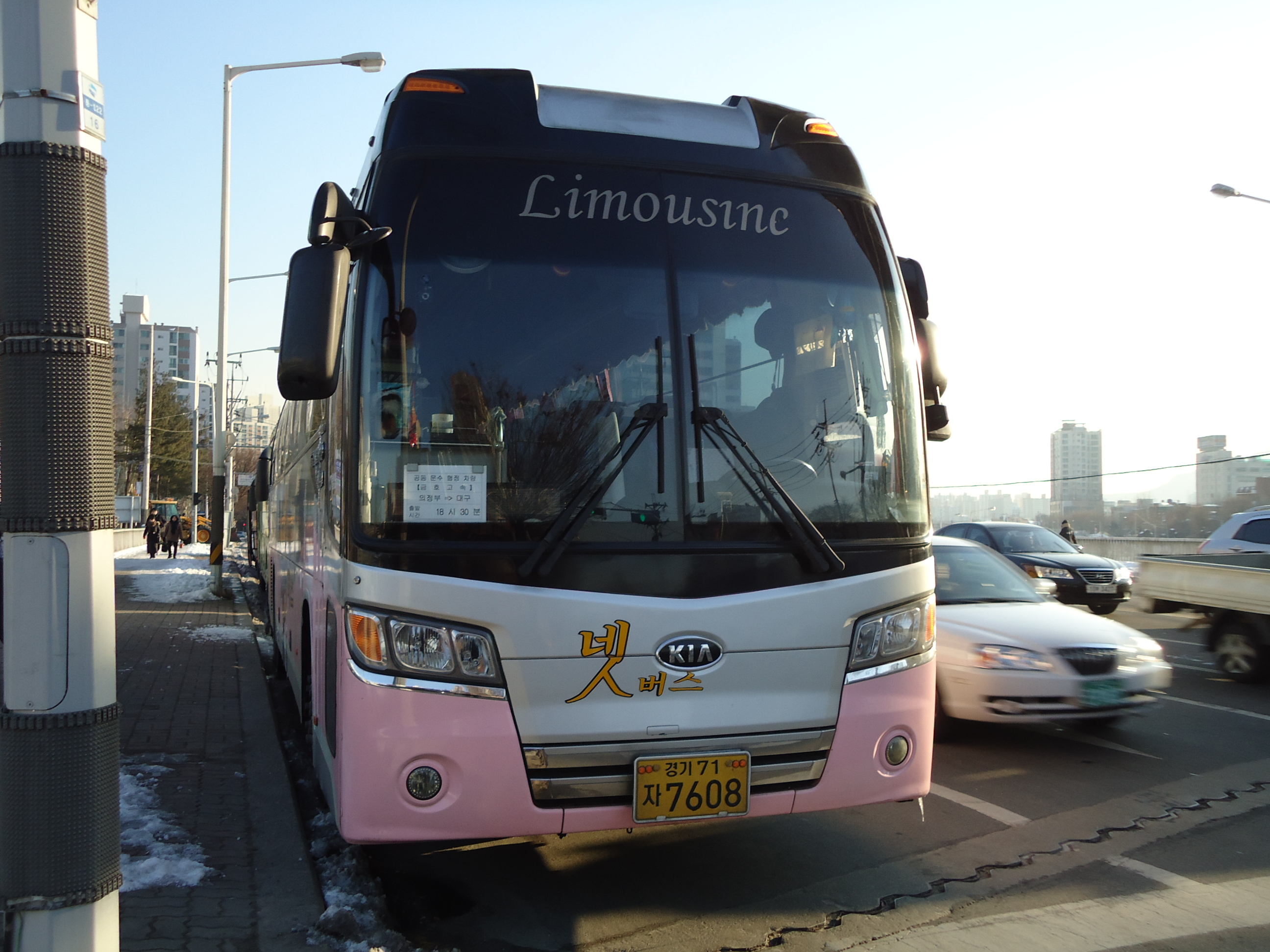 (금호고속 협정차) F/L 그랜버드 실크로드(의정부-동대구)